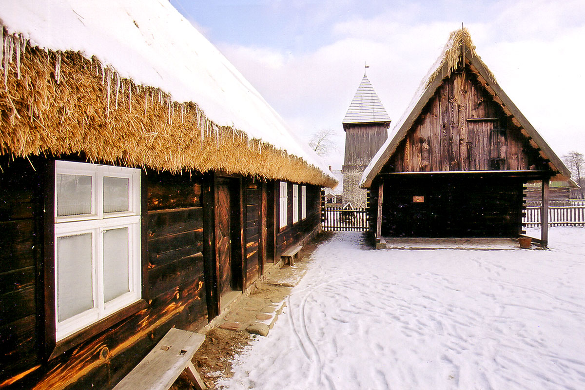 Ochla - skansen